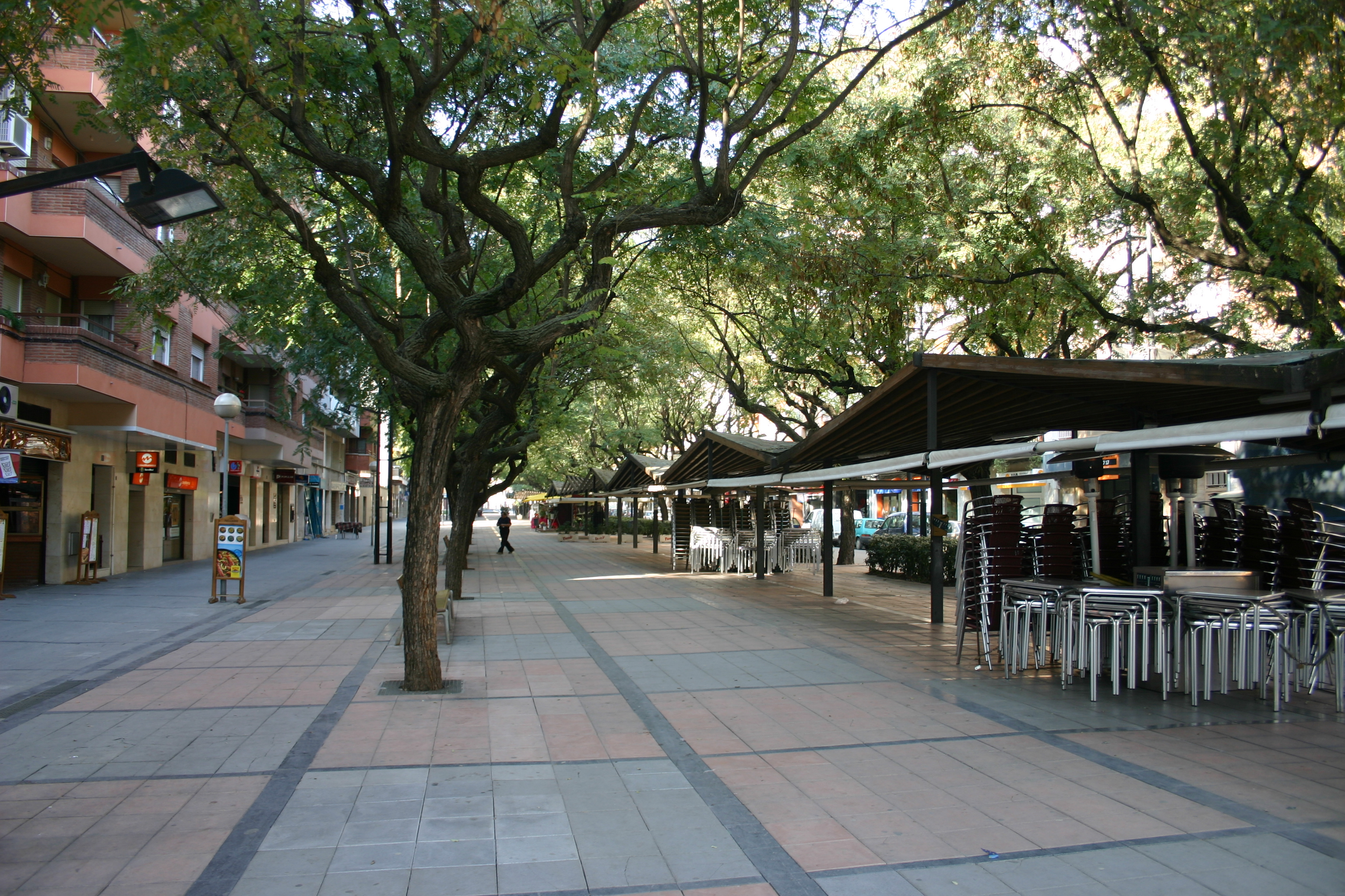 Rambla de Modolell City: Viladecans